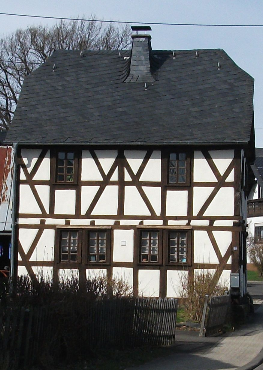 Das aus dem 18. Jahrhundert stammente Fachwerkhaus mit Krüppelwalmdach in Hundheim Dorfstraße 18, ist in der Liste der Kulturdenkmäler in Rheinland Pfalz verzeichnet.